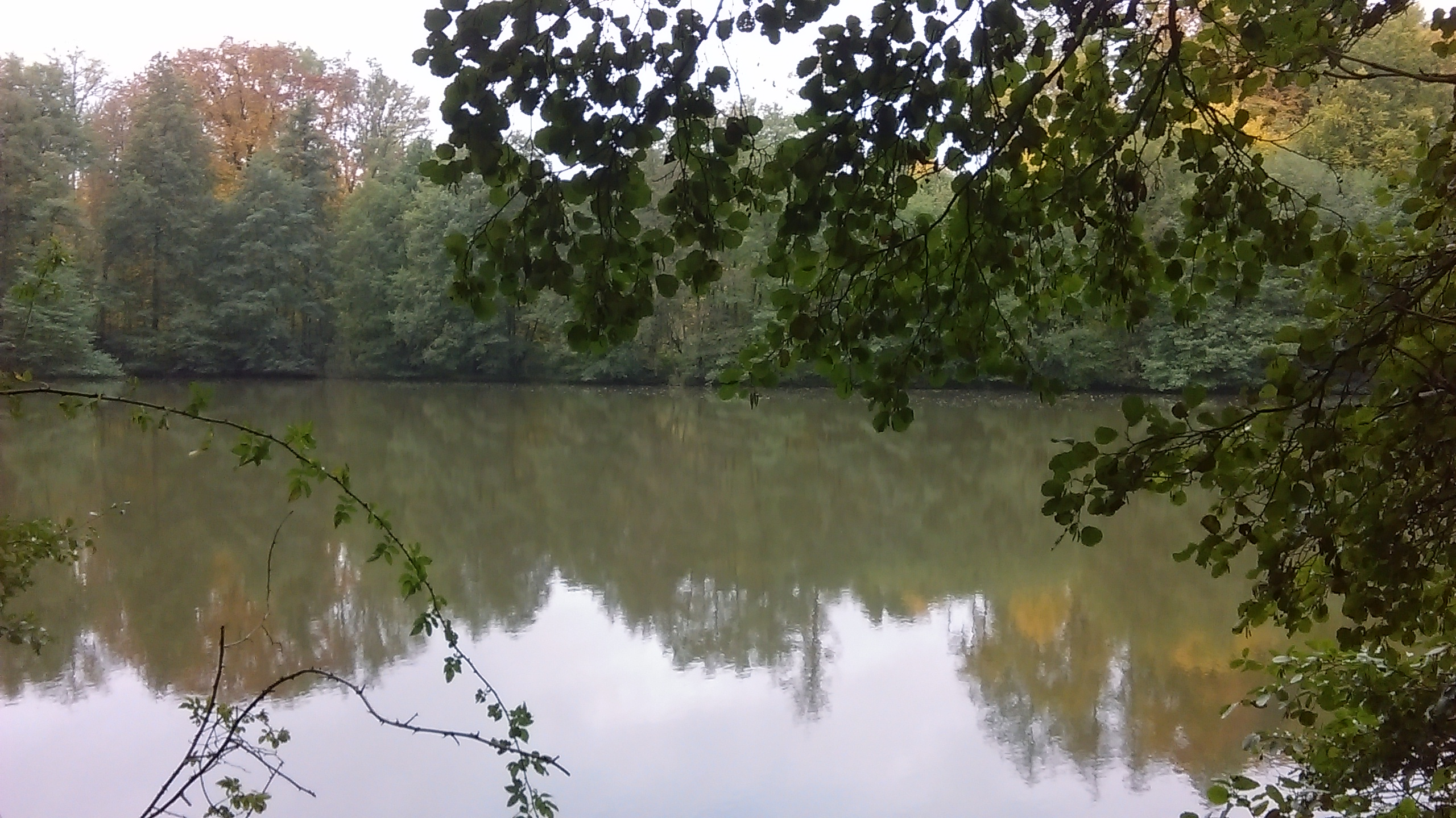 Dachsbauweiher nahe Westernhausen im Herbst, Flächenhaftes Naturdenkmal 81260720043, FFH-Gebiet 6622341 "Jagsttal bei Schöntal und Klosterwald".